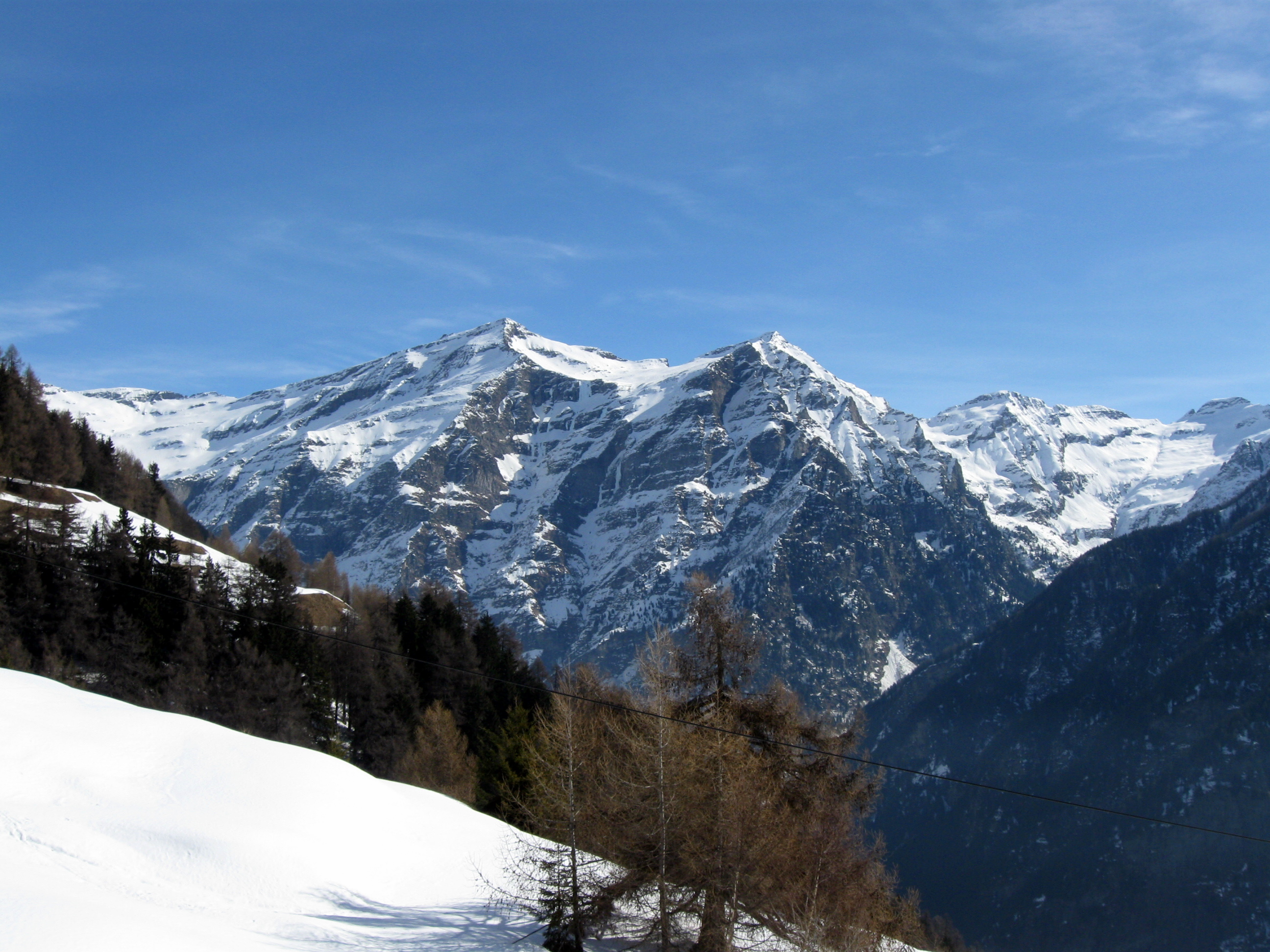 Salendo in Val Malvaglia la Cima Rossa (3161m a sinistra) e la Cima di Cogn (3063m a destra) mostranno il loro lato ostico